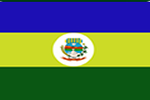 bandeira